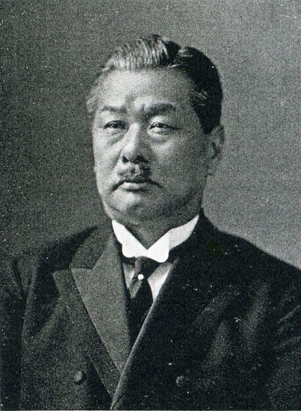 この写真は、森田茂（1872-1932）の写真です。